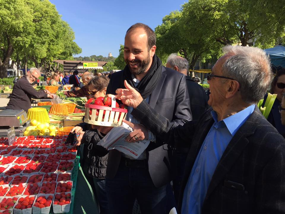 Scène sur un marché où l'on voit l'ancien maire et député de Nîmes